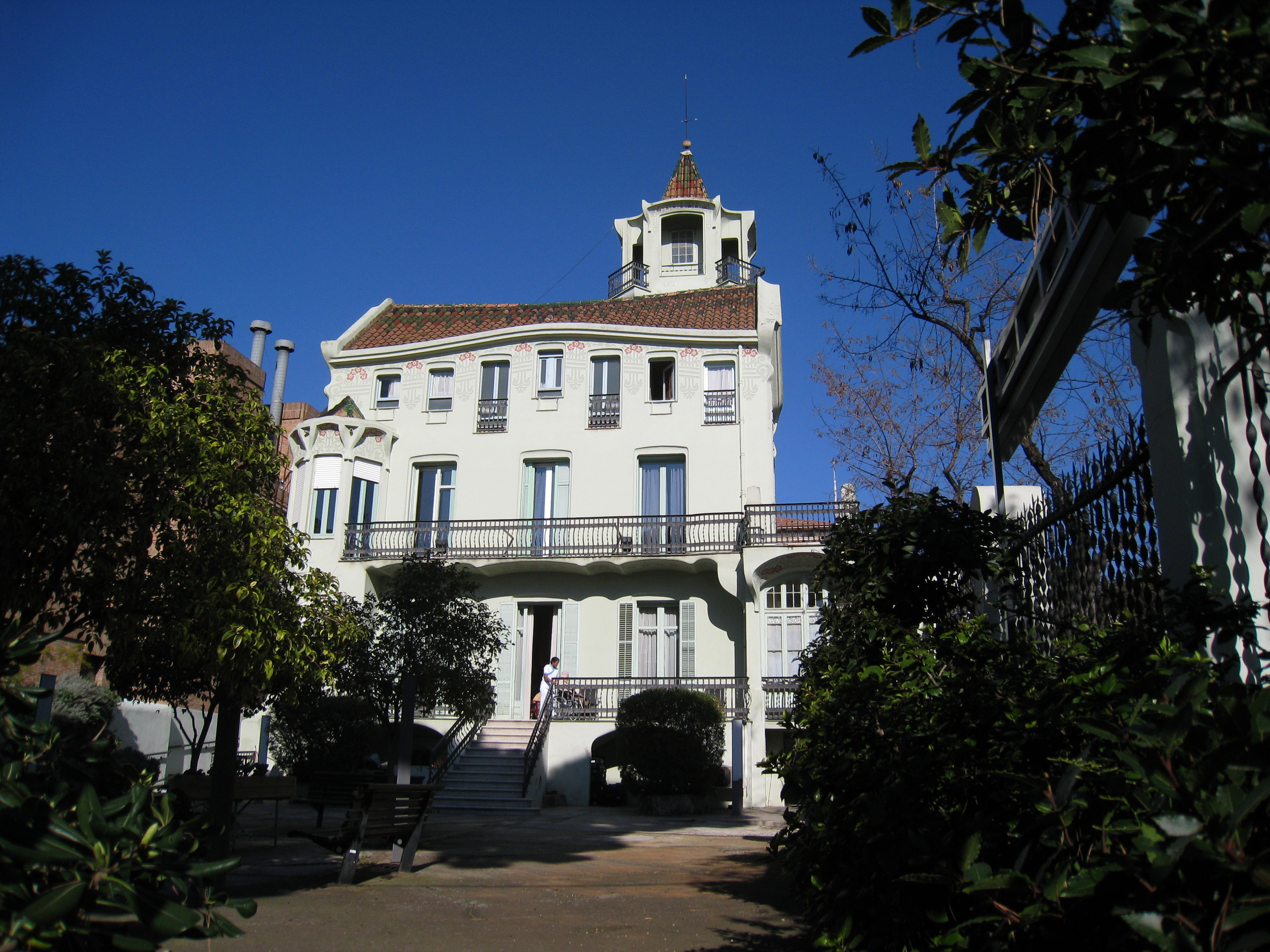 Casa Baurier, obra de Jaume Bayó i Font (Barcelona)